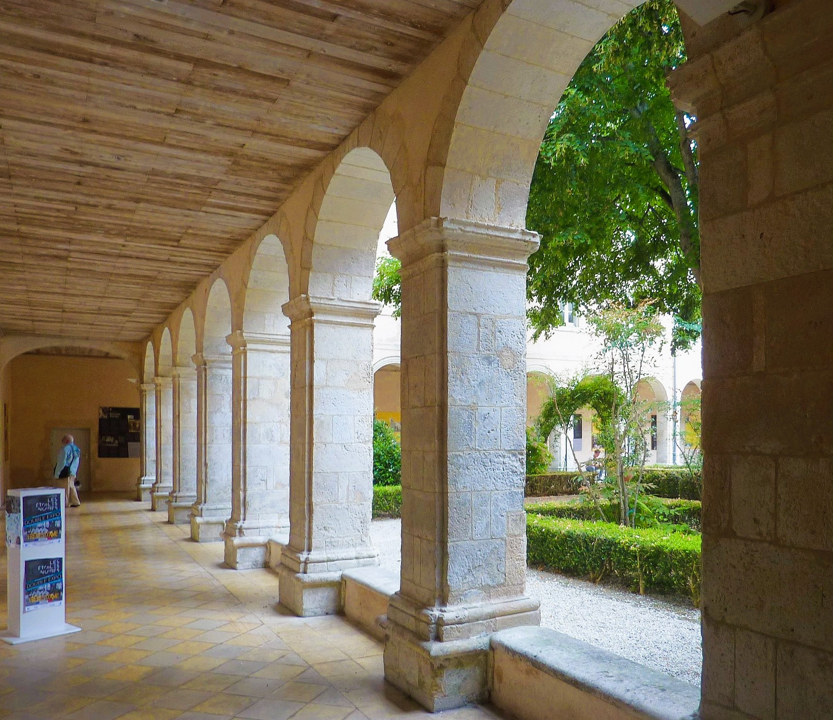 Couvent des dames blanches, La Rochelle